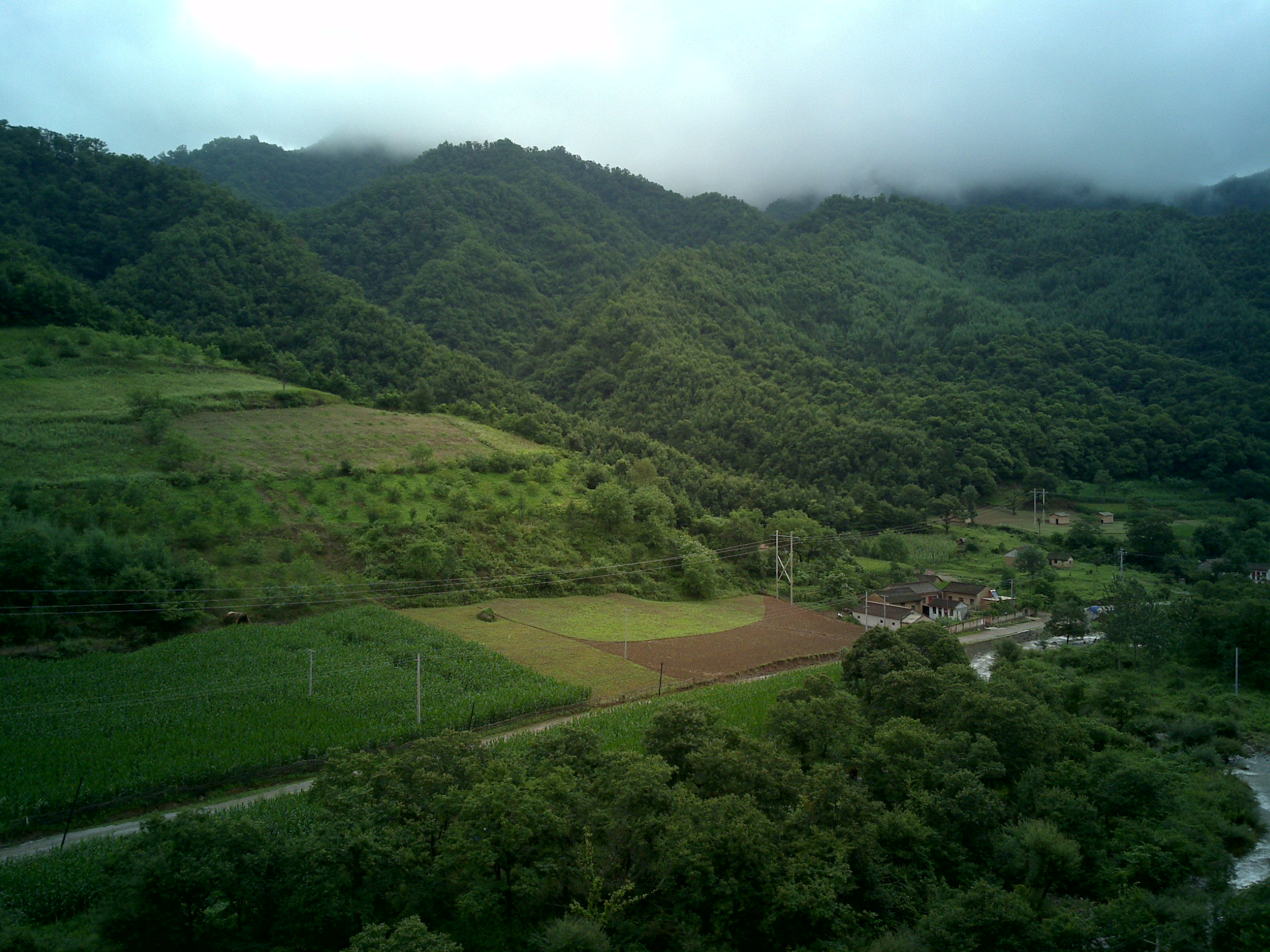 宝鸡天水高速 路边的景色